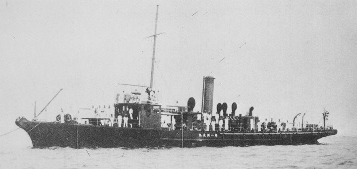 日本海軍雑役船『第一測天丸』、新造時